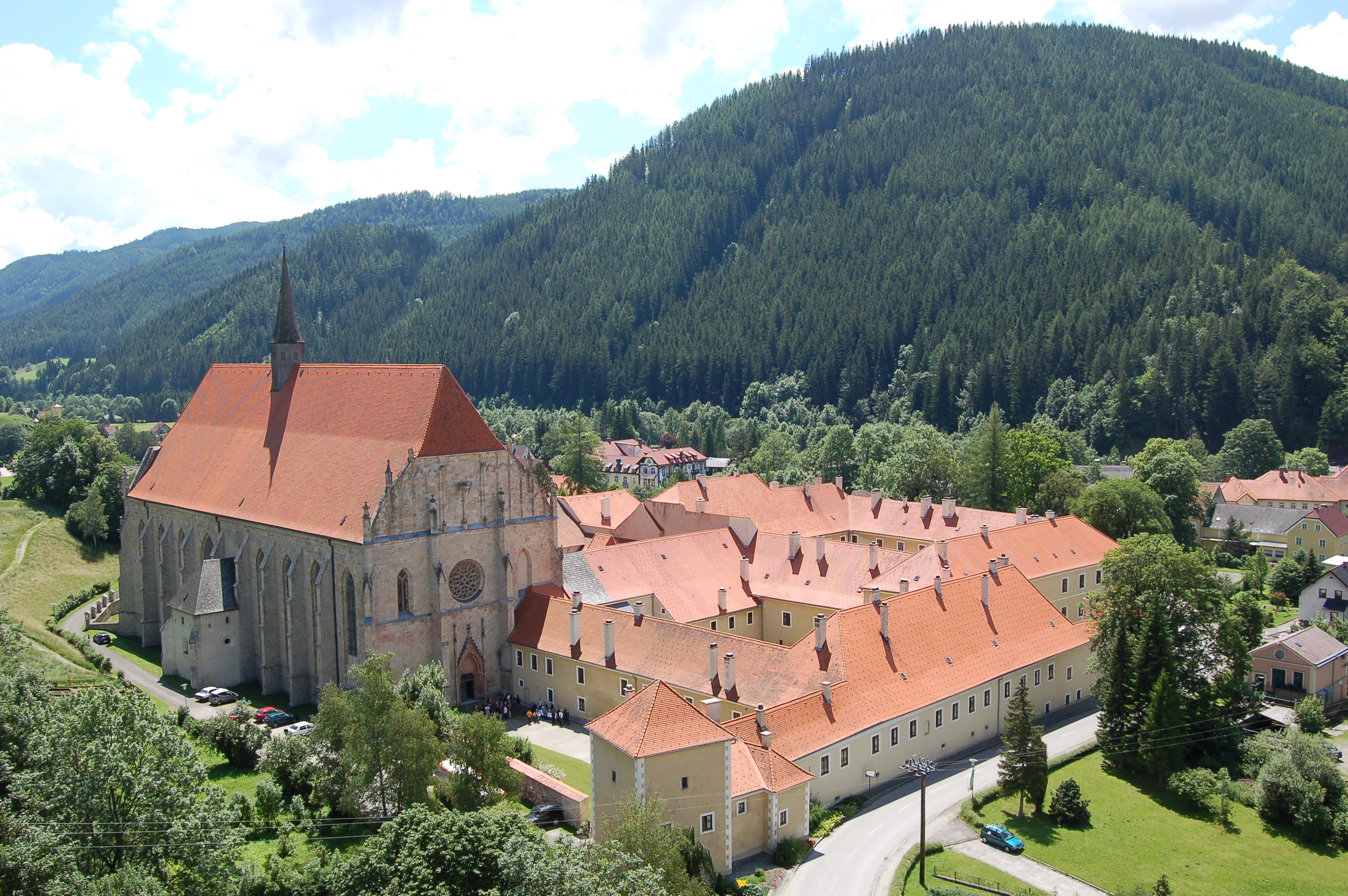 Ehem. Zisterzienserkloster-Stiftsgebäude mit wandfester Ausstattung und Ummauerung